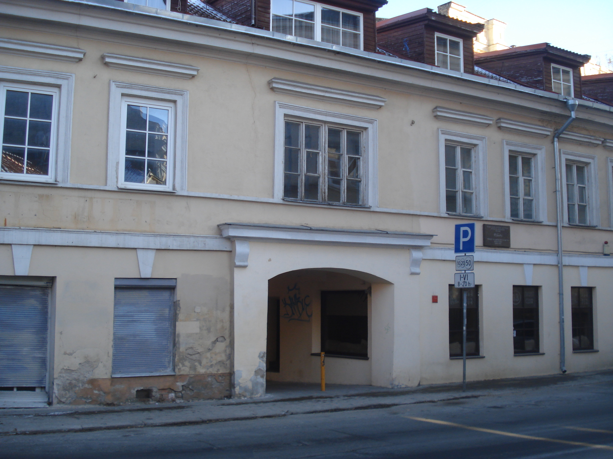 Дом, в котором жил художник Рафаэль Хволес. Улица Тилто 13, Вильнюс